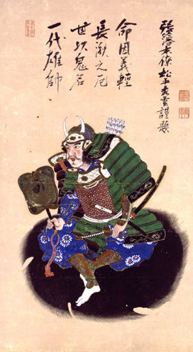 森長可(Mori Nagayoshi)